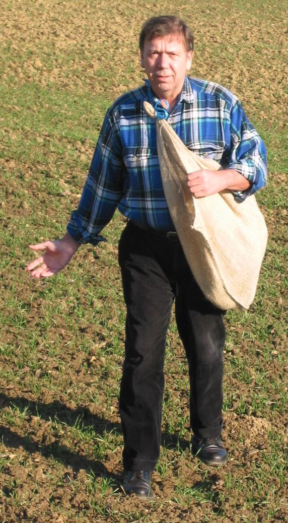 Breitsaat – Sämann mit Saatgutsack bei der Handsaat